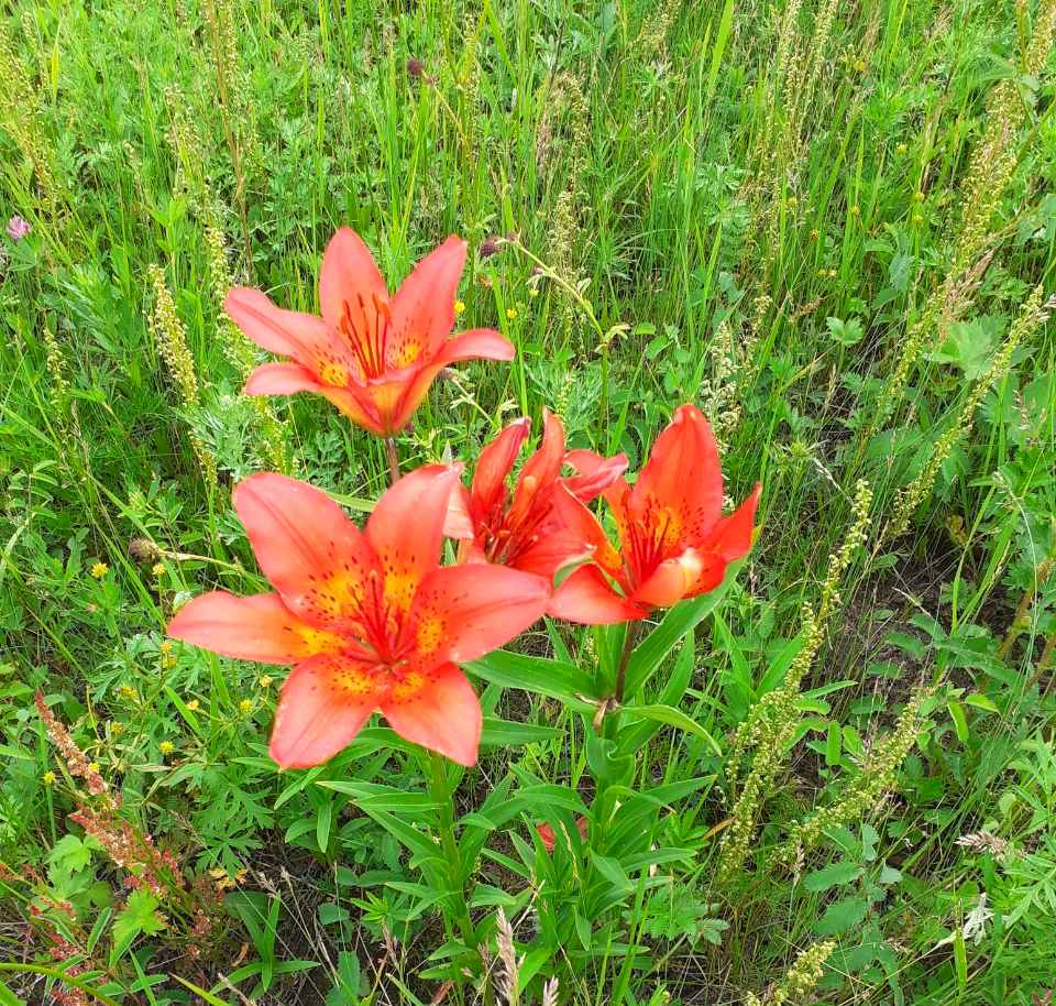 Lily. East Siberia.